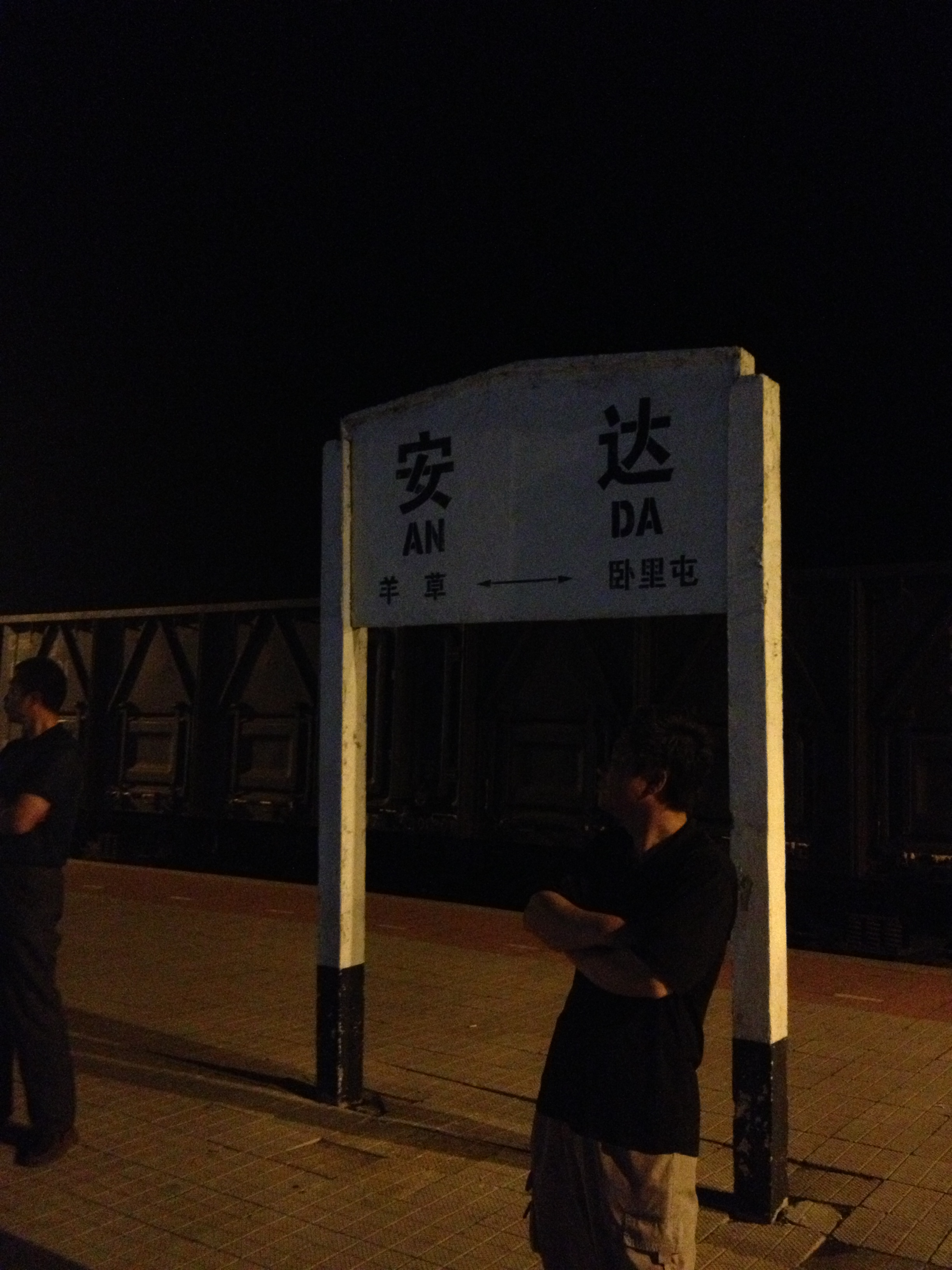 从安达到后贝加尔